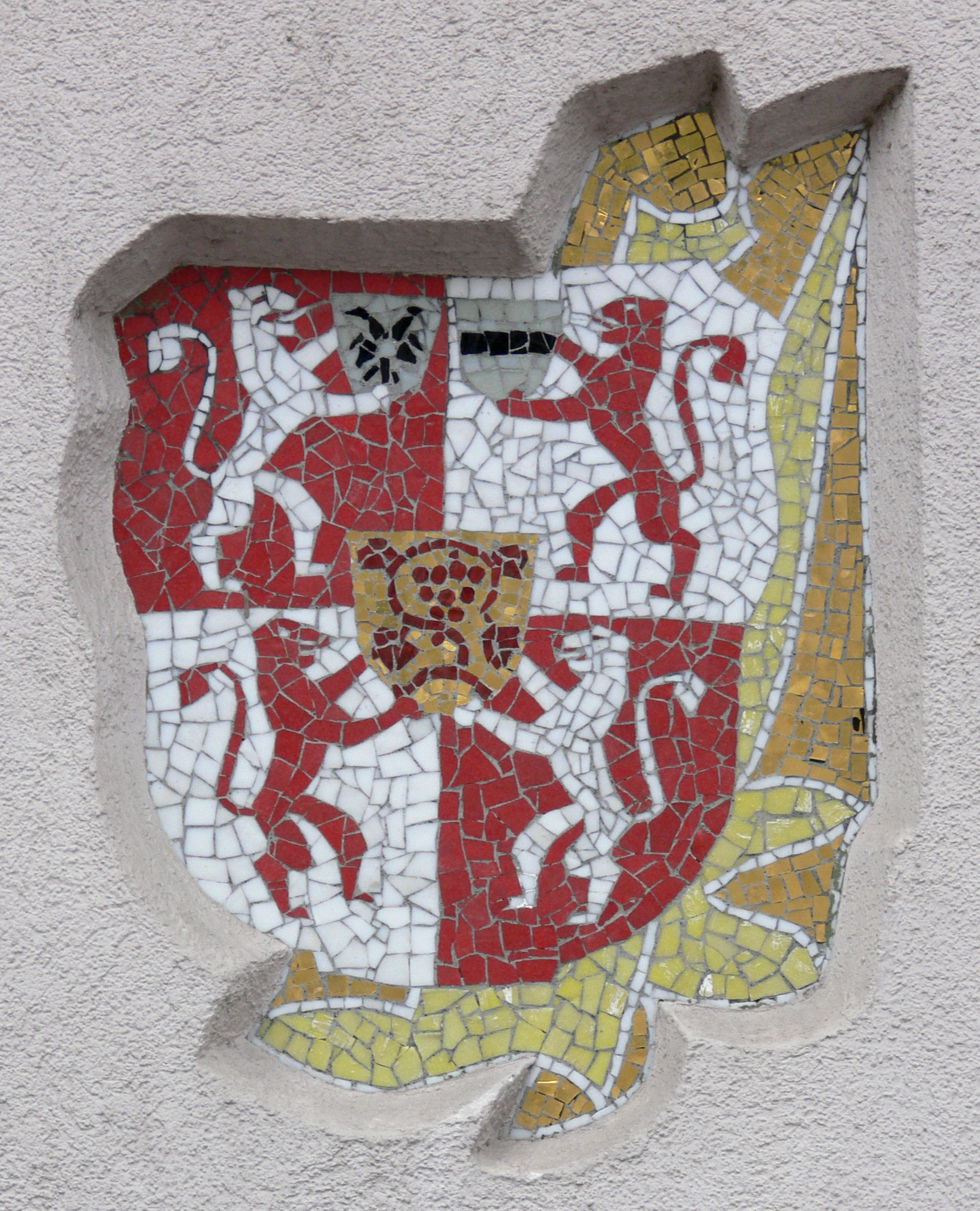 Weingarten (Württemberg), Stadtwappen als Mosaik an einem Haus in Weingarten